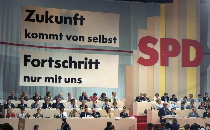 30.8.-2.9.1988 SPD-Parteitag in Münster, Halle Münsterland